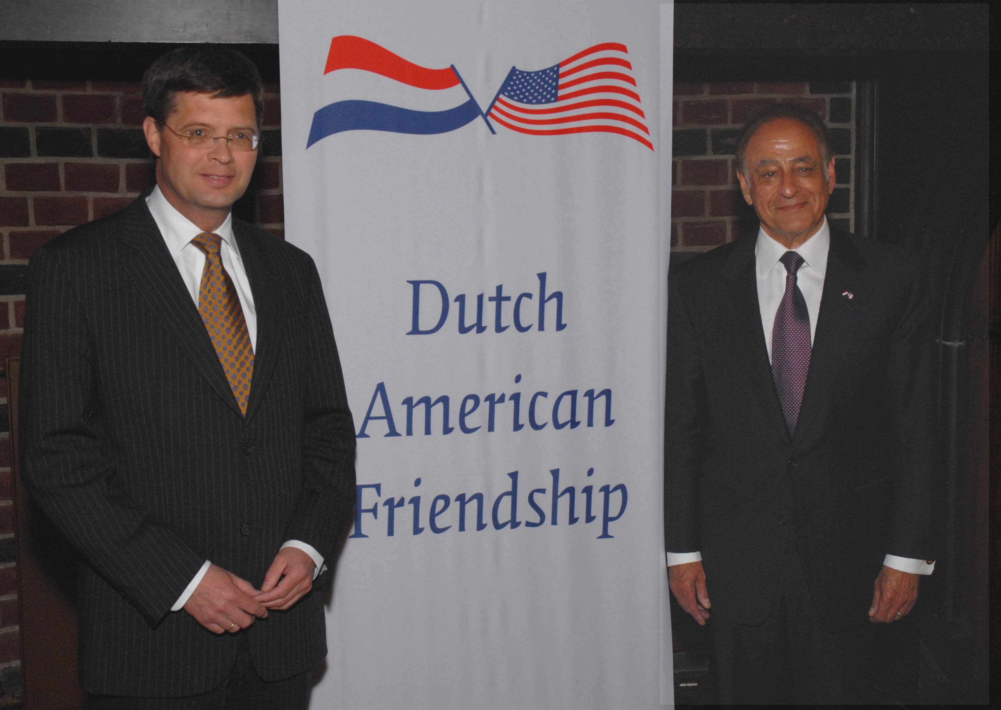 Former Dutch Prime Minister Jan Peter Balkenende and Ambassador Roland E. Arnall